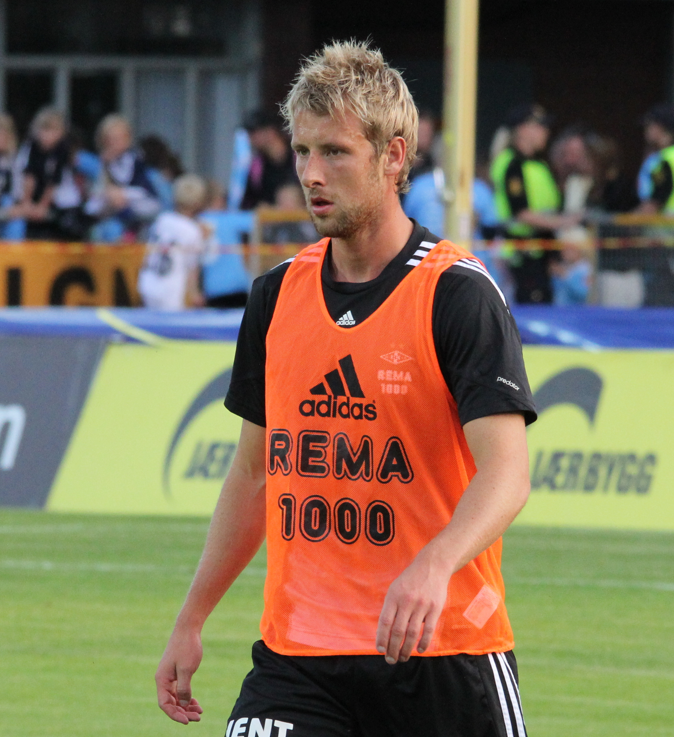 Tobias Mikkelsen på Sandnes stadion 25. august 2013